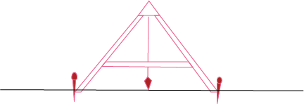 ลูกตุ้มฟูโกต์